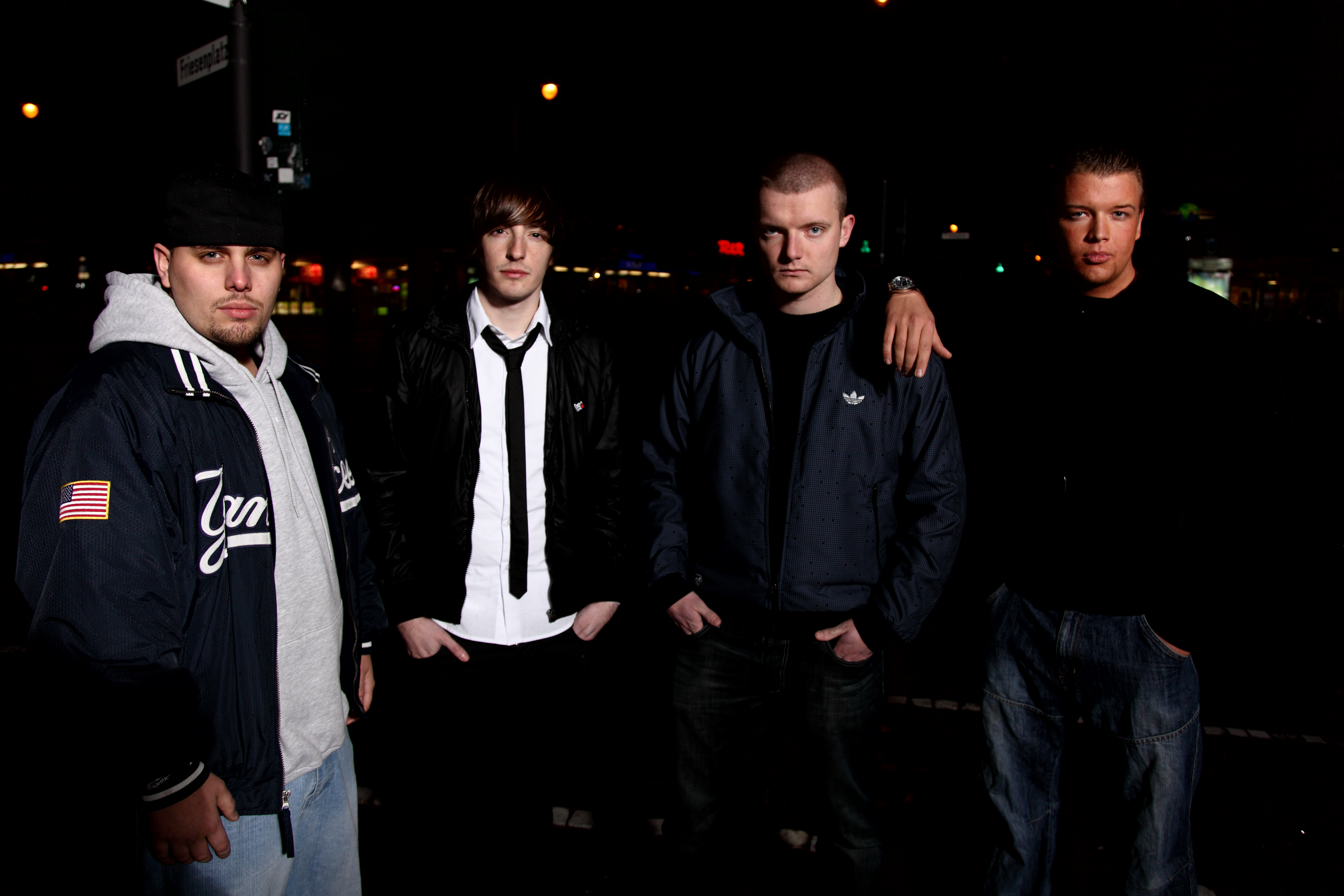 Pressefoto von Favorite, Casper, Shiml und Kollegah